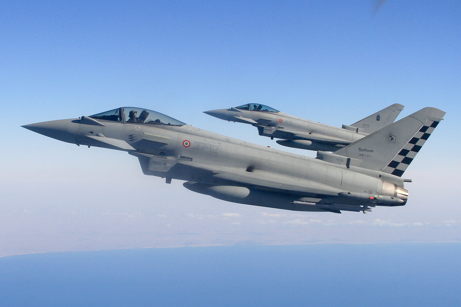 Foto cedida por Pedro de la Cruz